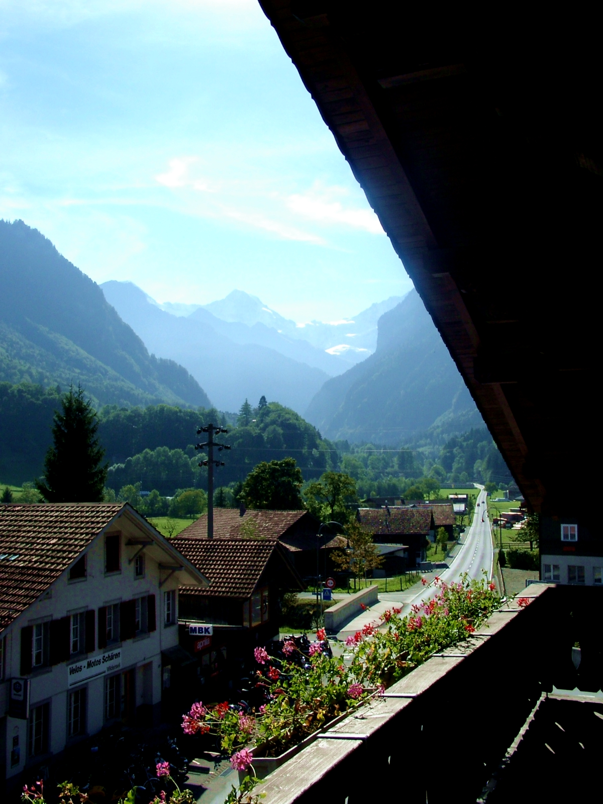 Wilderswil mit Blick zu Mönch und Jungfrau